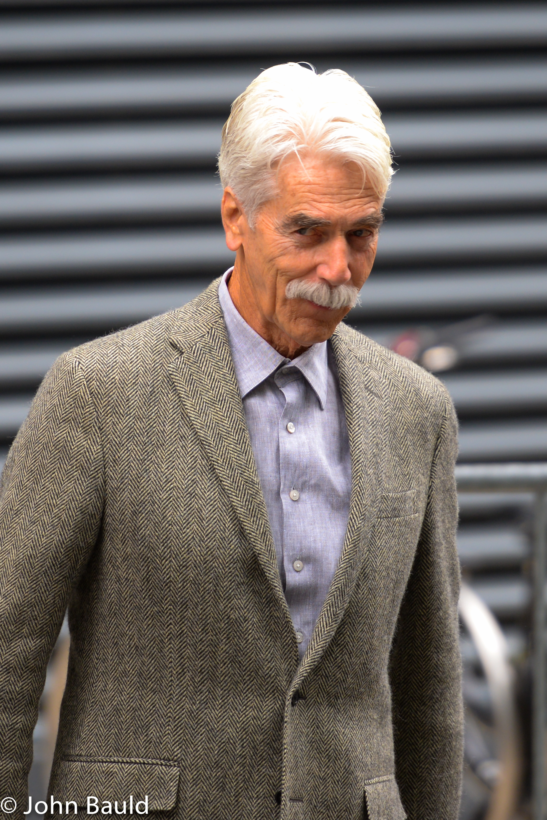 TIFF 2018 Samuel Elliott